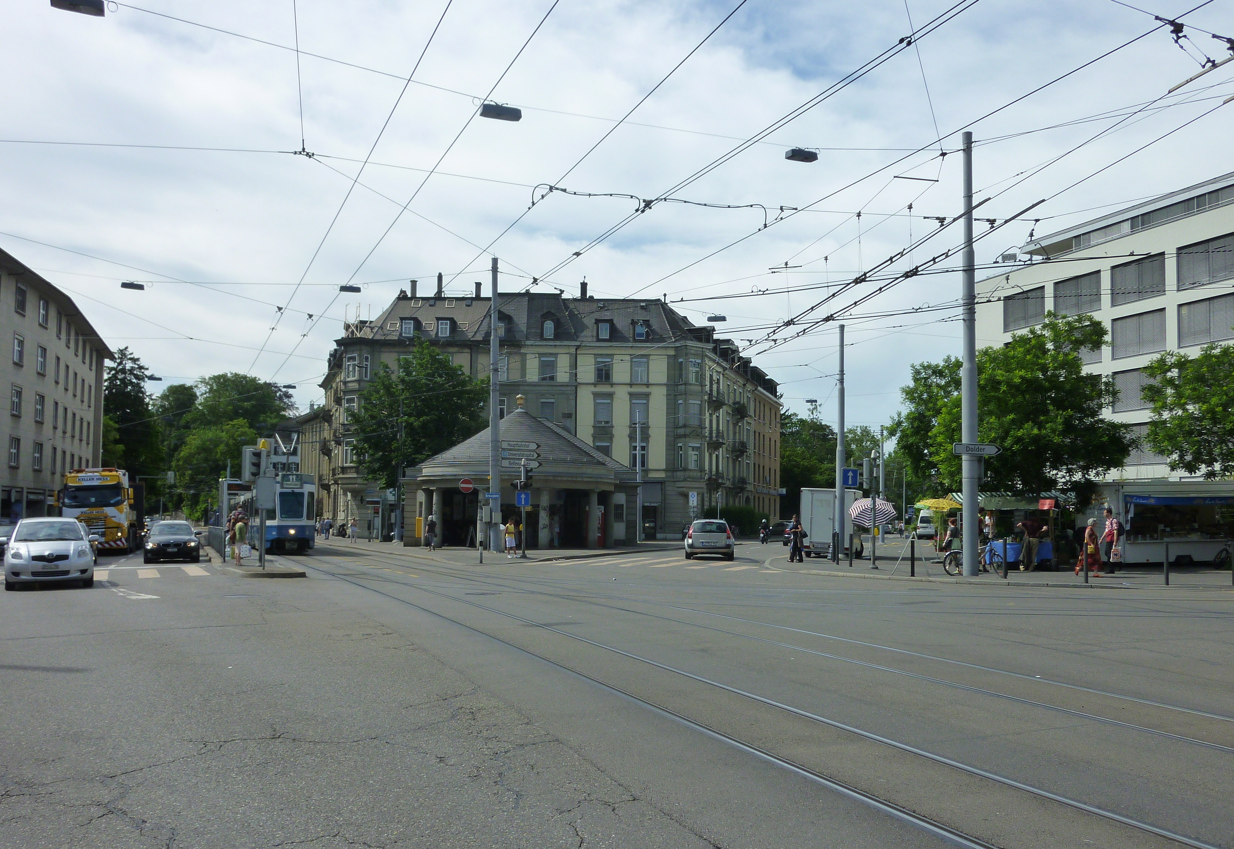 Kreuzplatz im Juni 2010 (Blick gegen Westen)